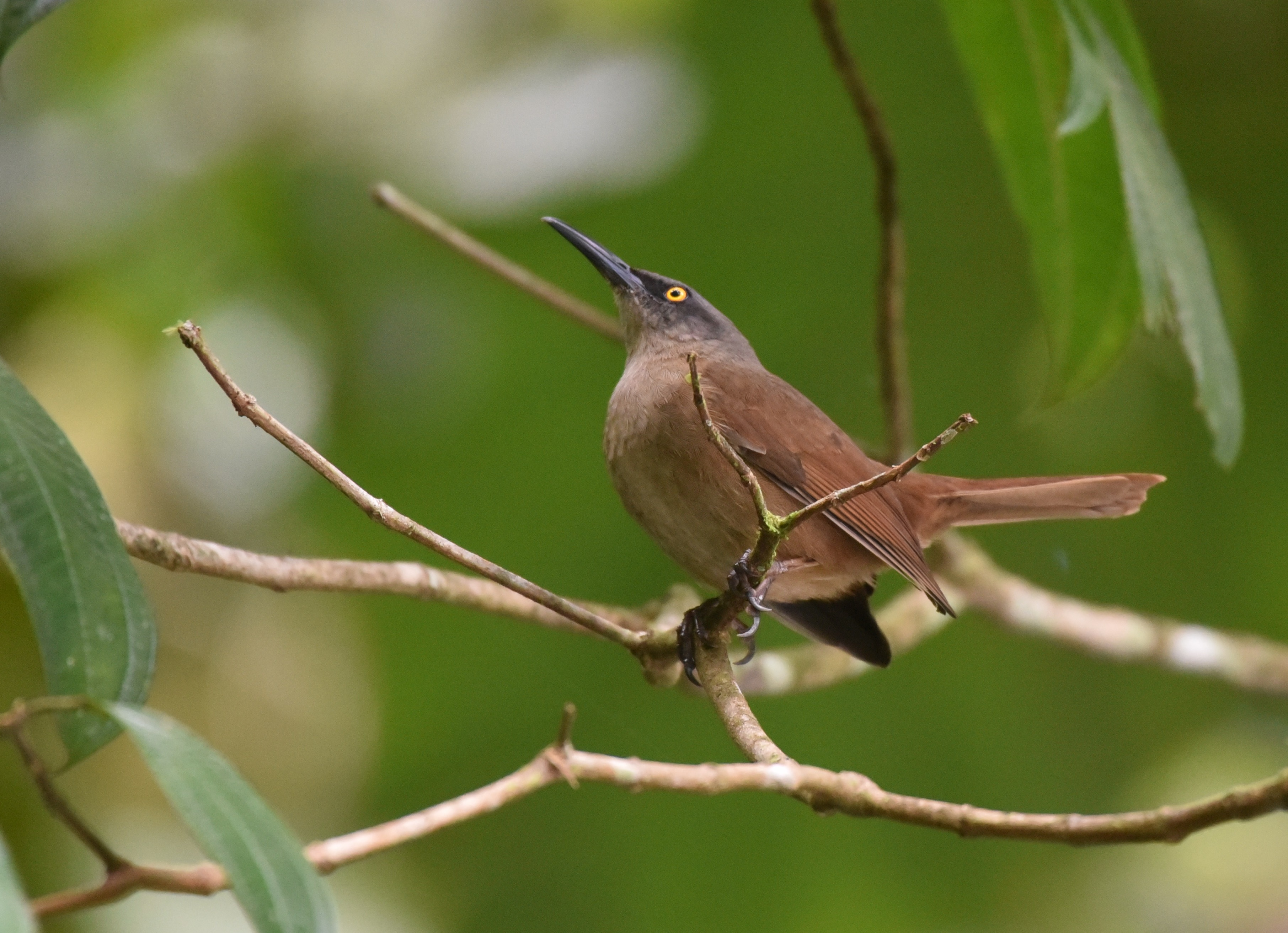 Braunzitterdrossel Cinclocerthia ruficauda tremula, Aufnahme im Parc national de la Guadeloupe